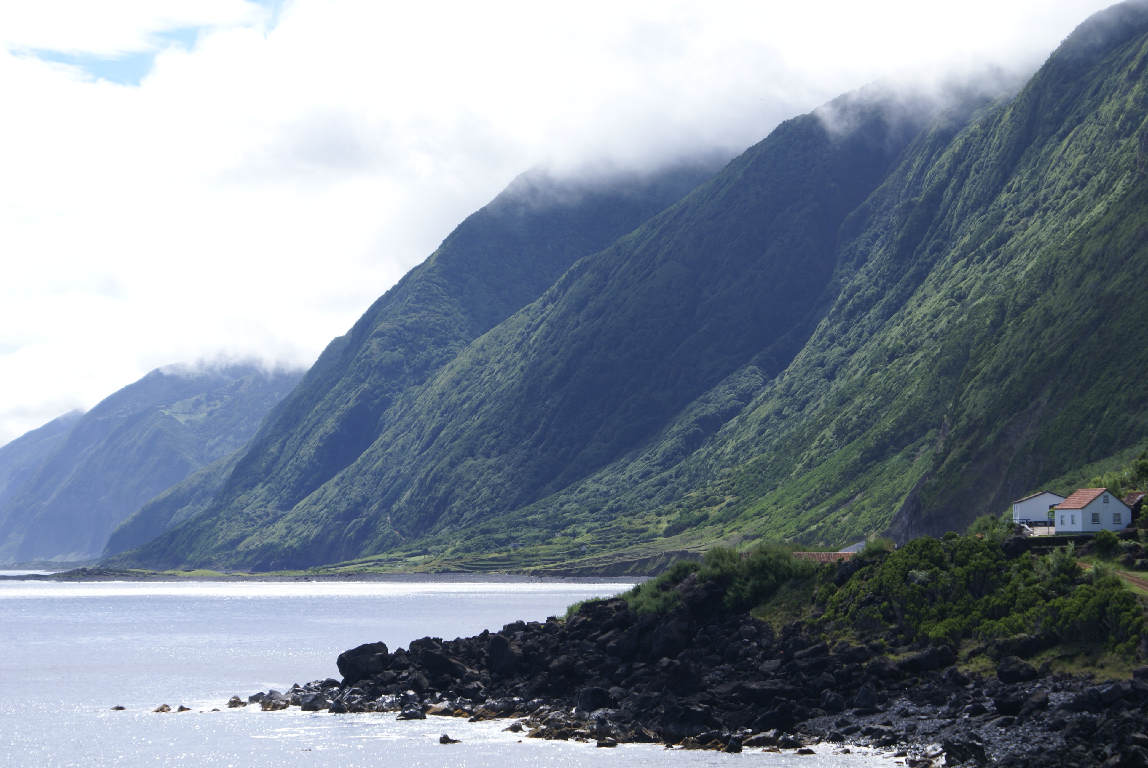 Fajã da Ponta Grossa ou do Mero, falésias, Norte Pequeno, Calheta, ilha de São Jorge, Açores